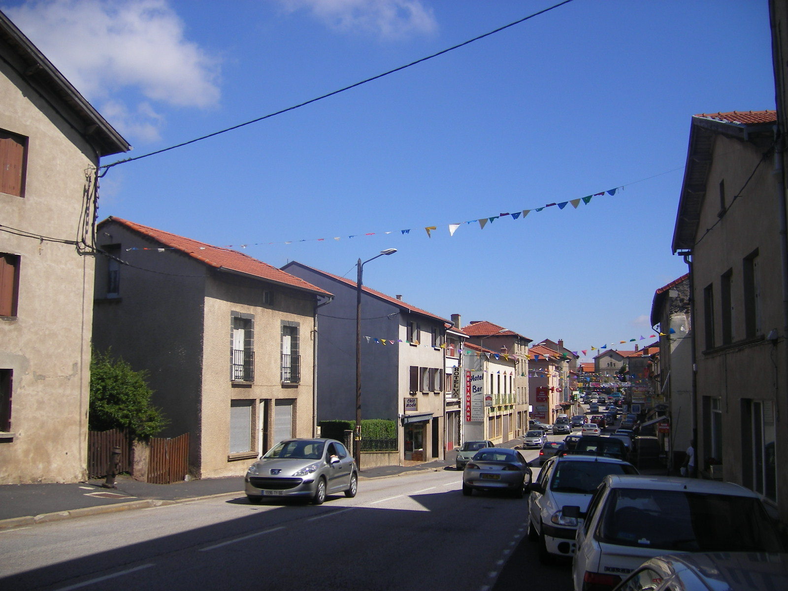 Costaros